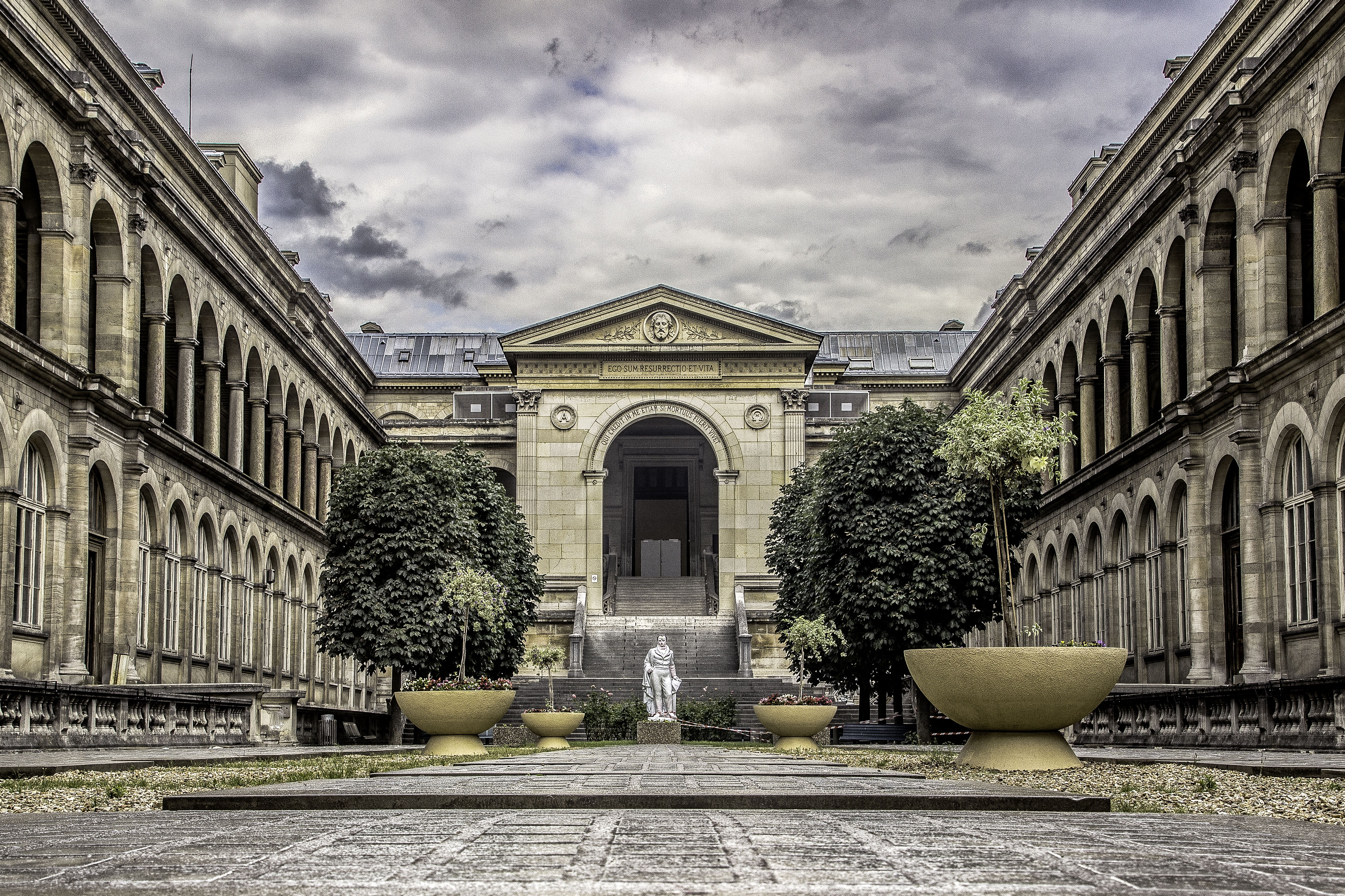 Hôtel-Dieu de Paris